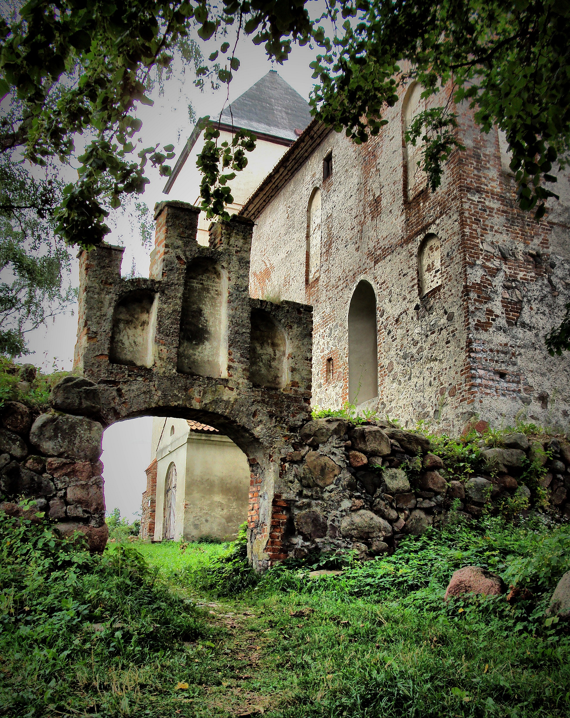 Zamek w Bezławkach, obecnie kościół filialny parafii w Wilkowie Wielkim (zabytek nr A-749 i 785 z 5.02.1968)